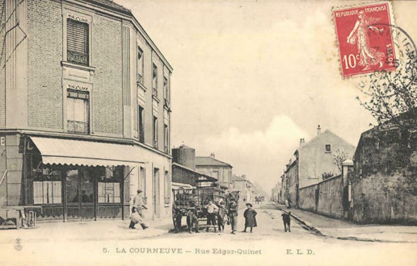 La Courneuve.Rue Edgar-Quinet.Carriole